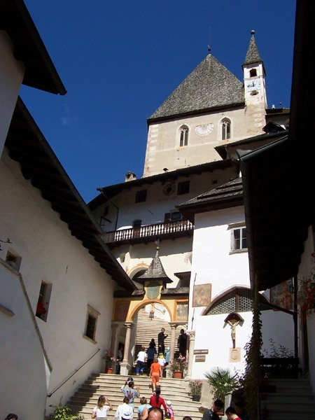 Sanzeno - Santuario di S. Romedio